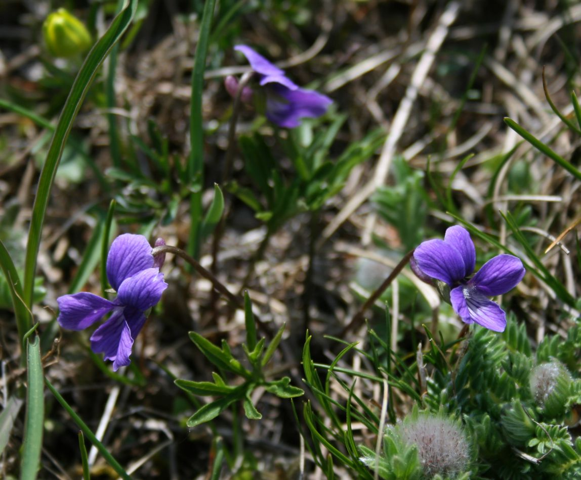 Viola pinnata, Veilchengewächse (Violaceae) - Slowenien/Slovenija/Slovenia: Trnovski gozd, Kucelj